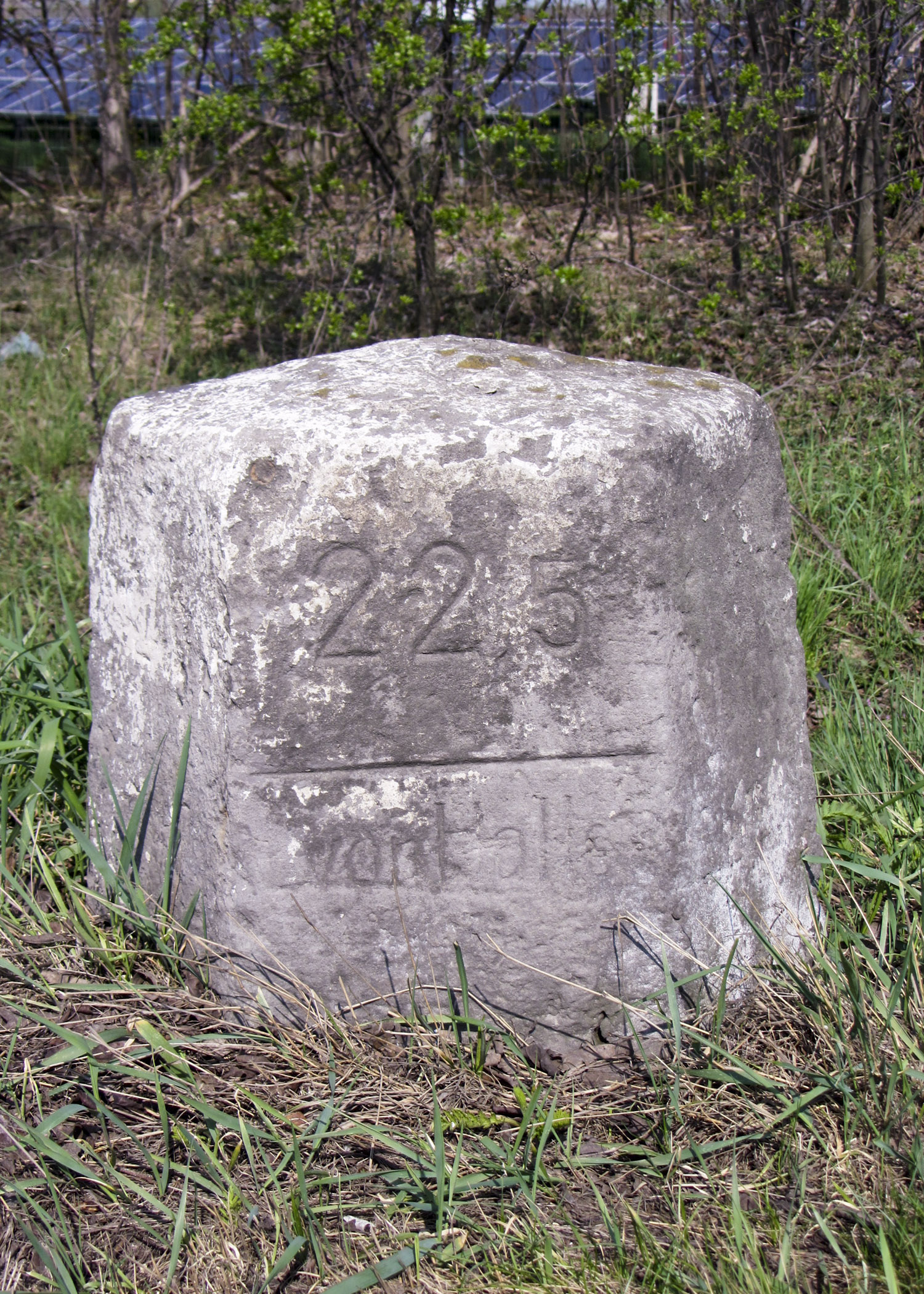 Myriameterstein an der B100 bei Roitzsch